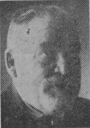 Albert Siösteen